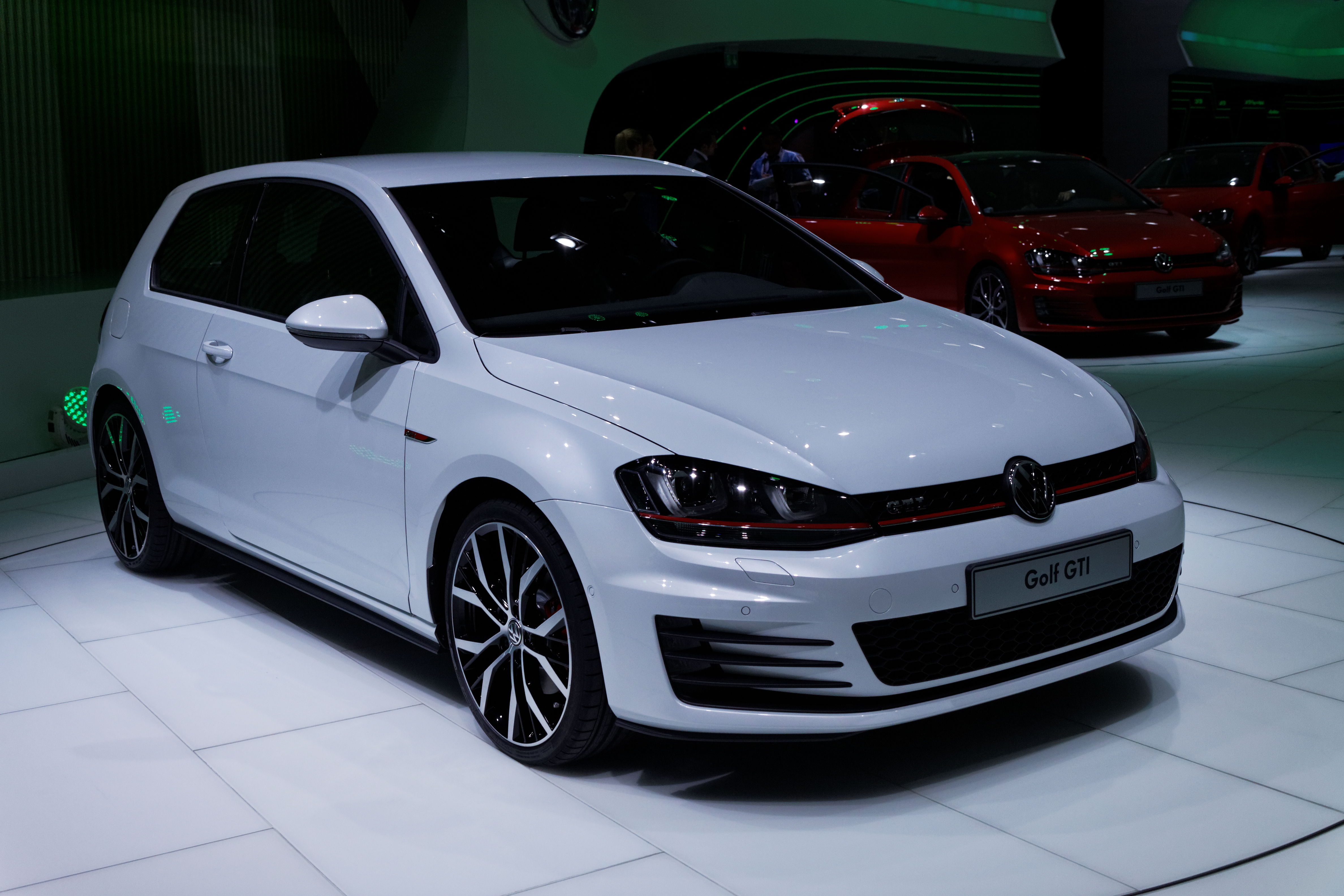 Une Volkswagen Golf GTI présentée lors du Mondial de l'automobile de Paris 2012.